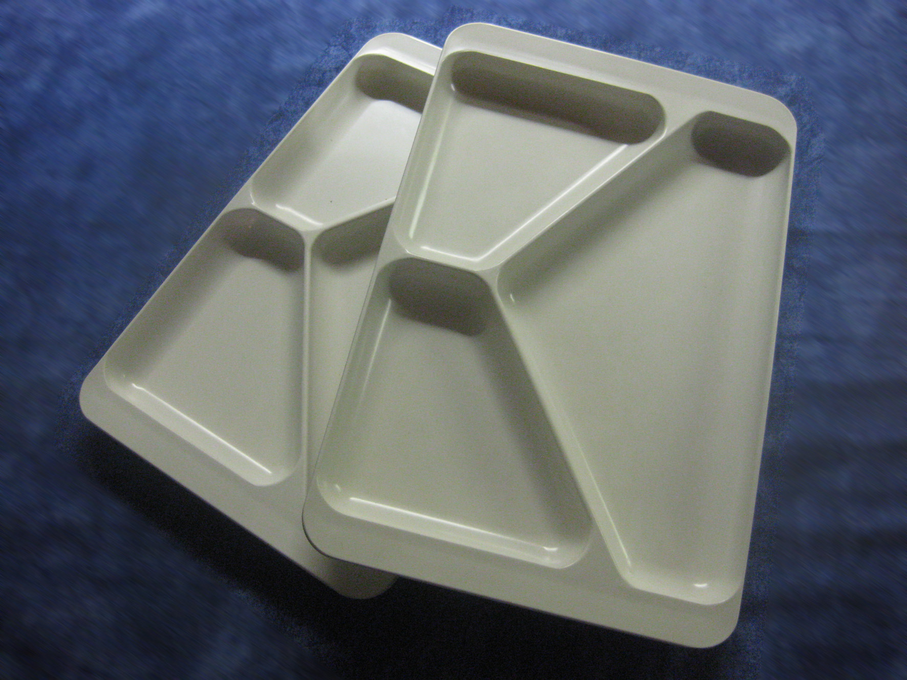 Bis in die 1970er Jahren wurde auf eine große Modularisierung in der Gastronomie geachtet, die von der Speisenausgabe an der Heißen Theke bis hin zur Großküchentechnik reichte. Kantinenteller des VEB Plasta Werke Sonneberg, "Made in GDR".